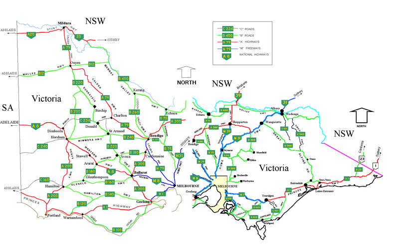 Carte routière de l'état de Victoria